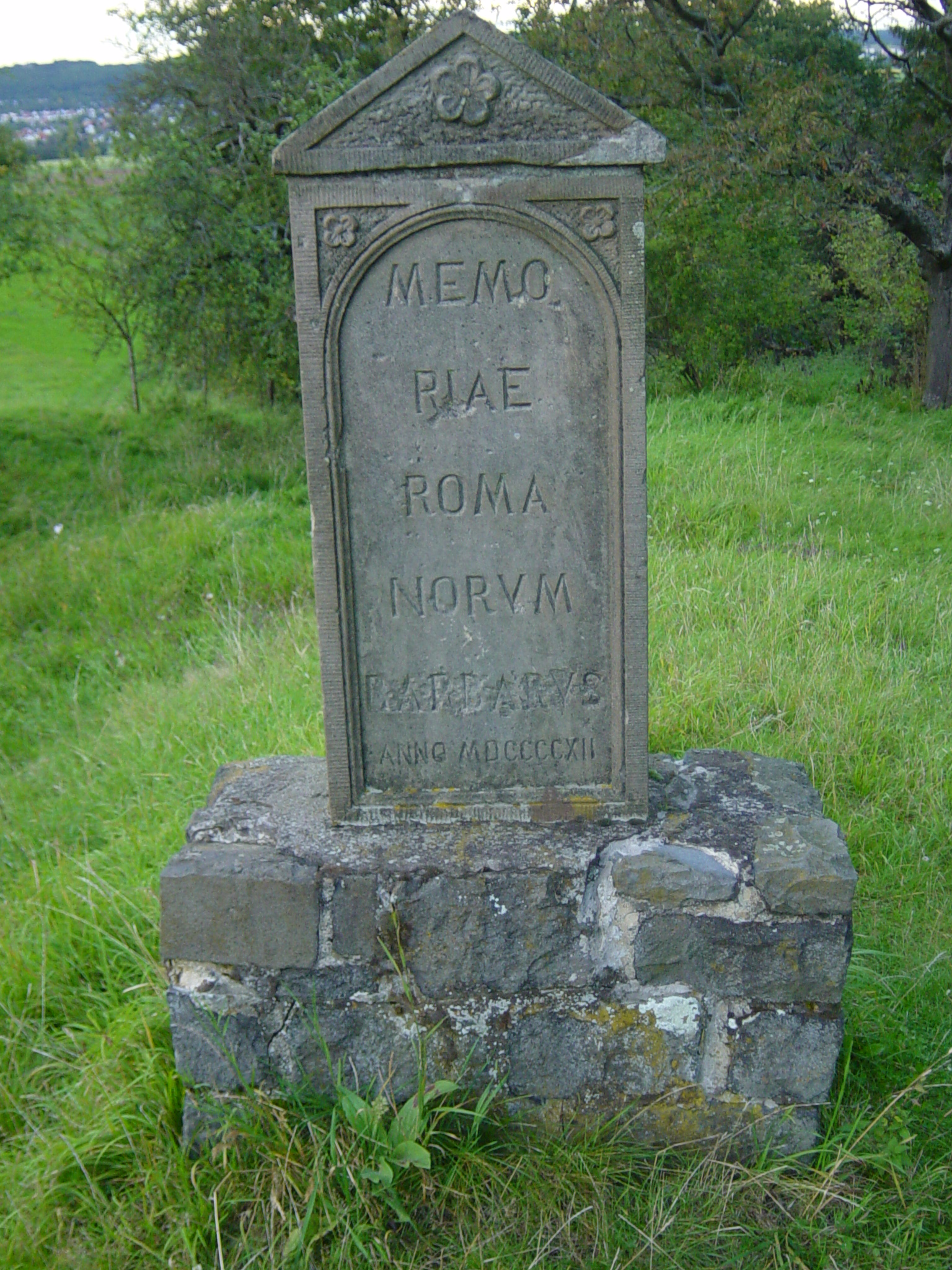 „Barbarenstein“ (1912) am Römerturm bei Pohlheim, am Obergermanischen Limes. Aus der Hinweistafel: "(...) Der Turm steht auf einem Grundstück, das der Gießener Psychatriedirktor Prof. Dr. Robert Sommer 1910 vom Fürsten von Braunfels erwarb. Mit dem Ankauf sollte die drohende Zerstörung des an dieser Stelle noch hervorragend erhaltenen Wallgrabens durch landwirtschaftliche Nutzung verhindert werden. (...) Im Sommer 1912 ließ Robert Sommer gemeinsam mit seiner Frau Emmy hier einen Gedenkstein errichten, den sog. Barbarenstein. Seinen Namen verdankt der Stein der eingemeißelten Inschrift. Sie gibt Zeugnis von der Geschichtsauffassung zu Beginn des 20. Jahrhunderts, die auf eine Polarisierung zwischen römischer Zivilisation und einem idealisierten Germanentum abzielte (...) Vorderseite: LIMES IMPE RII ROMANI (Grenze des römischen Reiches) Rückseite: MEMO RIAE ROMA NORUM BARBARUS ANNO MDCCCCXII (Dem Andenken der Römer, ein Barbar im Jahre 1912)"